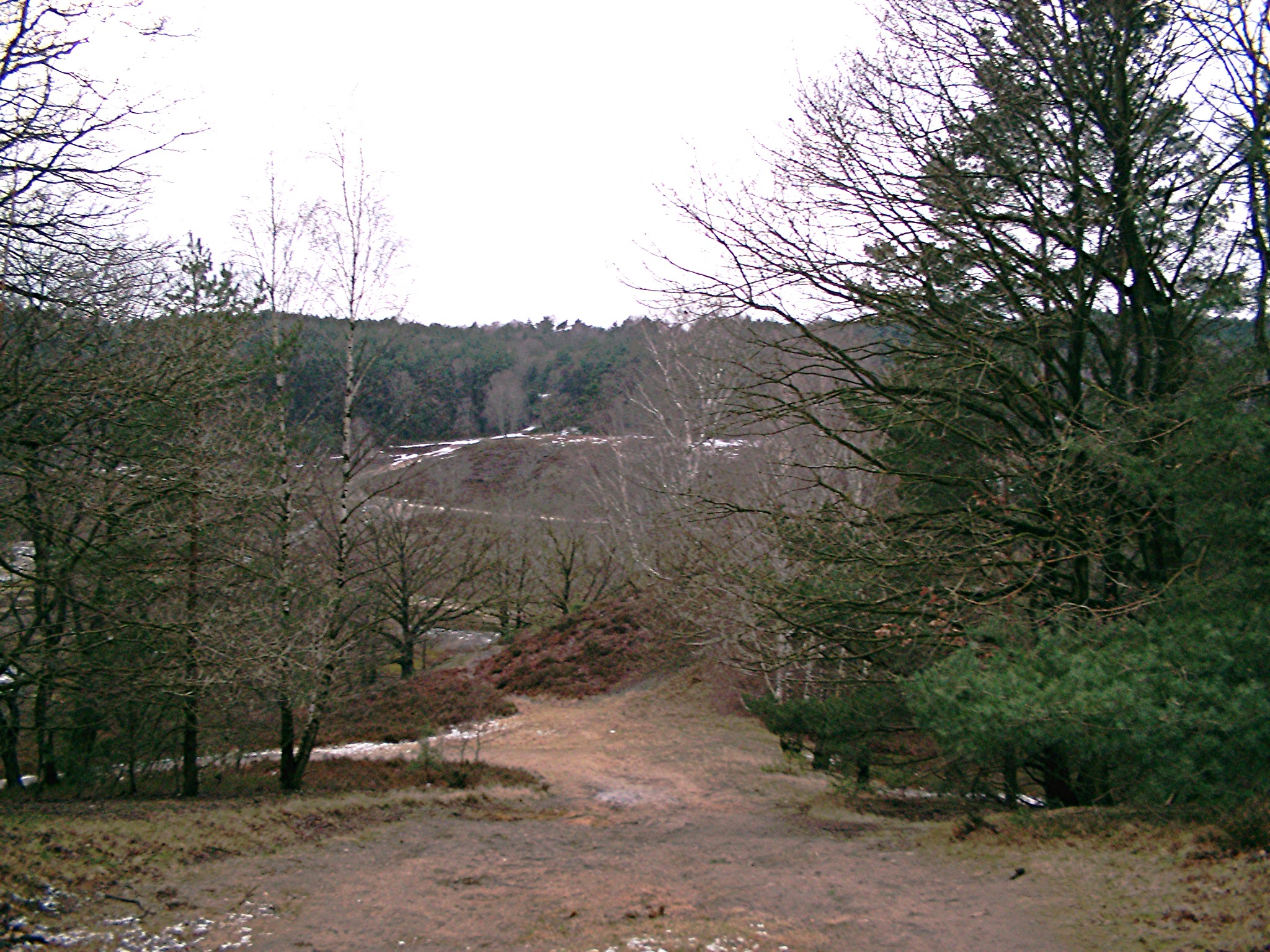 Fischbeker Heide (Hamburg-Neugraben-Fischbek, 13. Februar 2005).